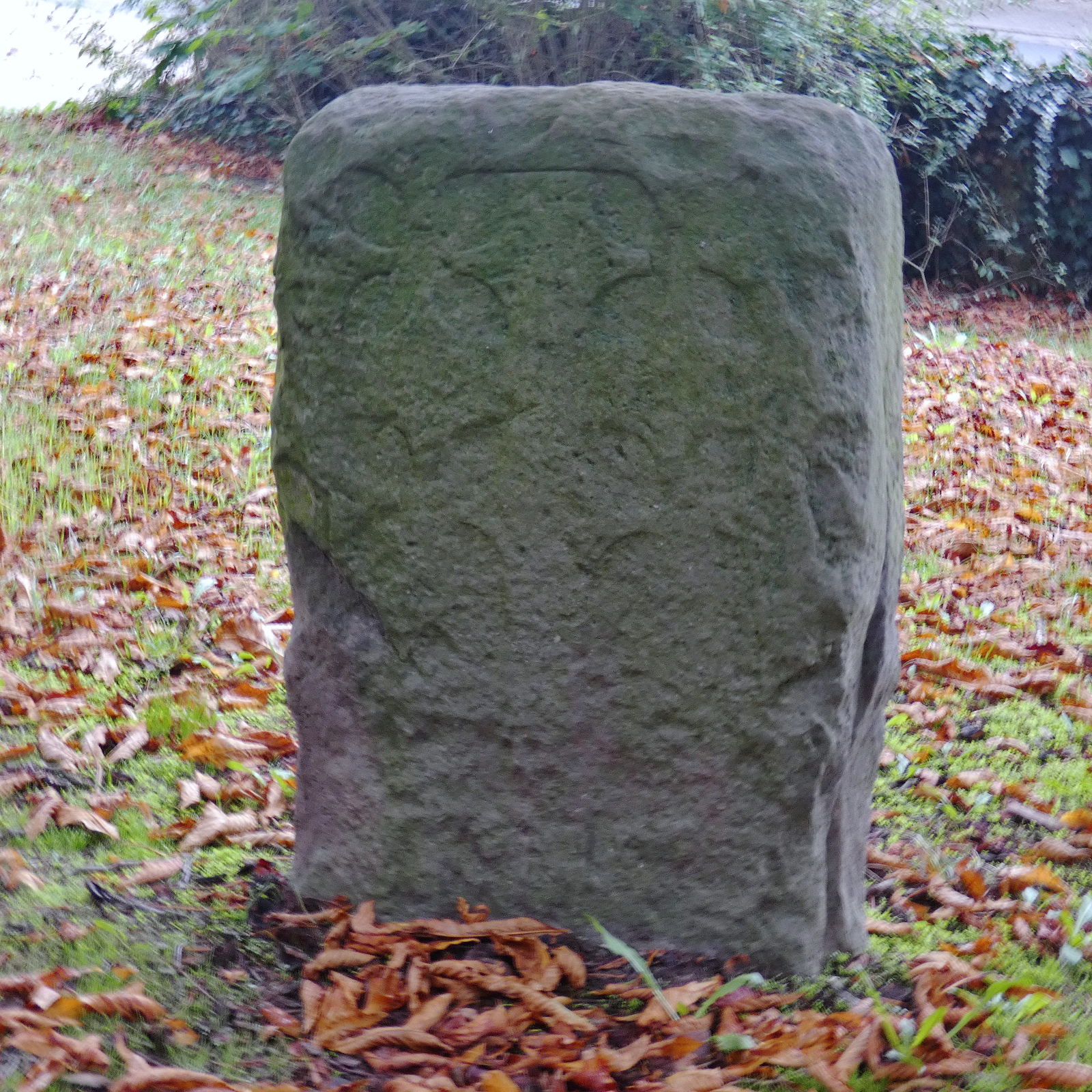 Die Kreuzsteine, oder früher die 5 Steine, sind eine Gruppe von Kreuzsteinen in Hiddestorf, einem Stadtteil von Hemmingen in der Region Hannover in Niedersachsen